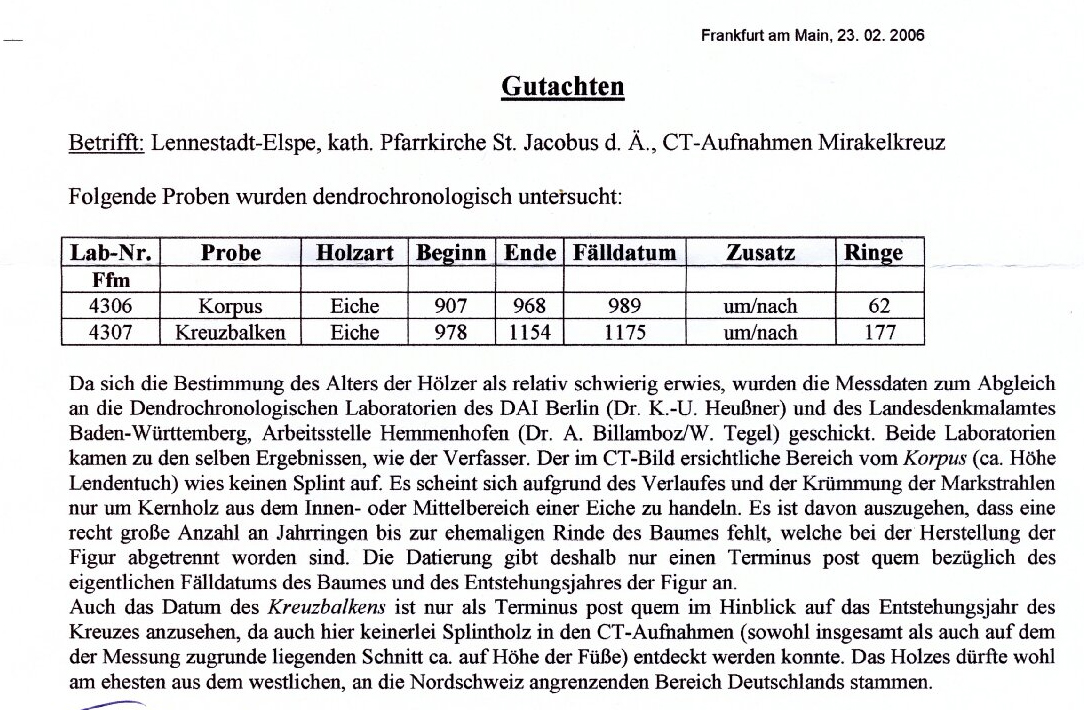 Dendrochronologisches Gutachten zum Mirakelkreuz Elspe